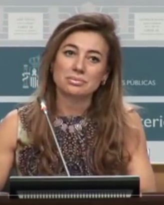 Marta Fernández Currás 2012.